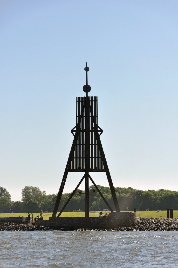 Kugelbake 2012)